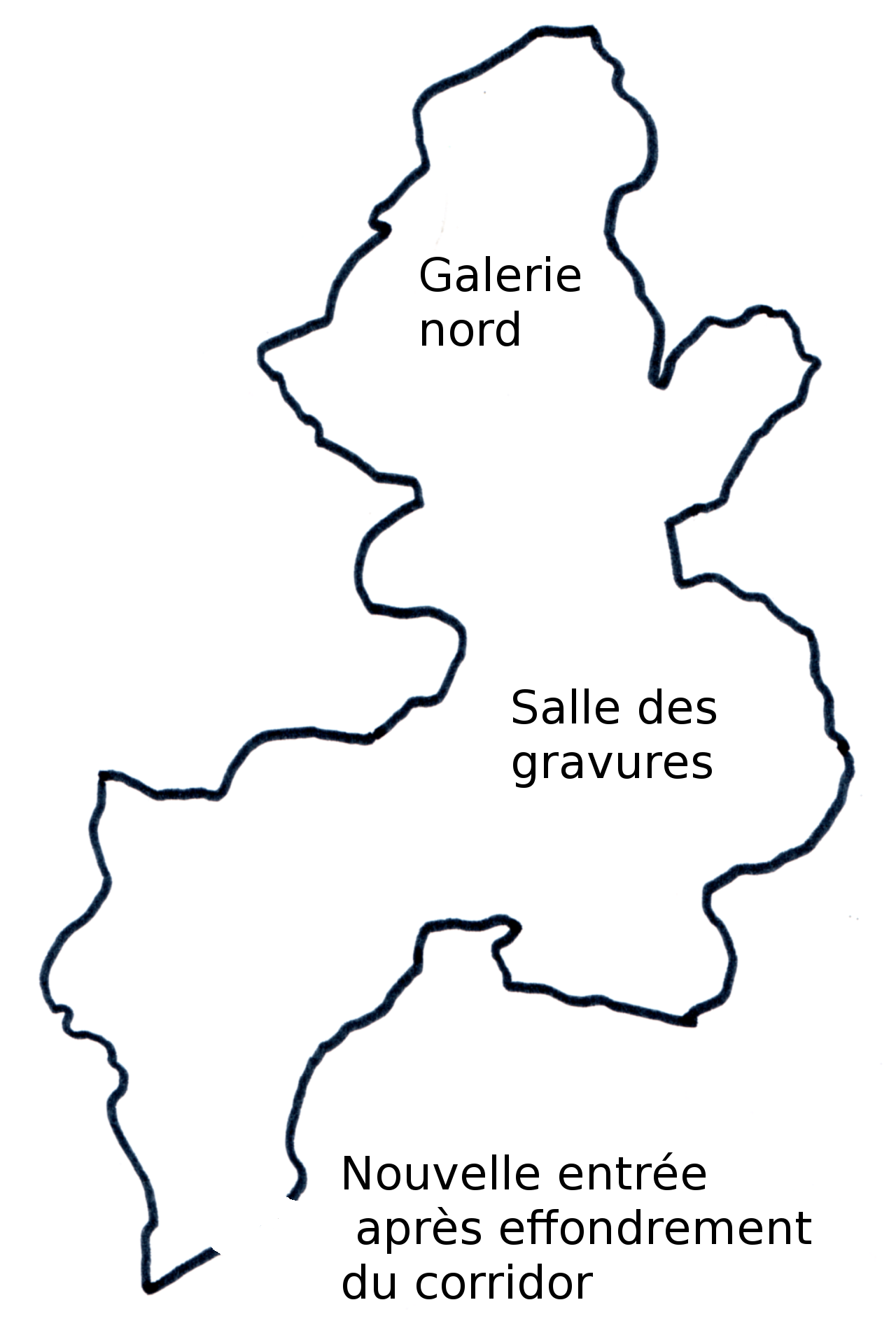 plan de pair-non-pair au Périgordien inférieur